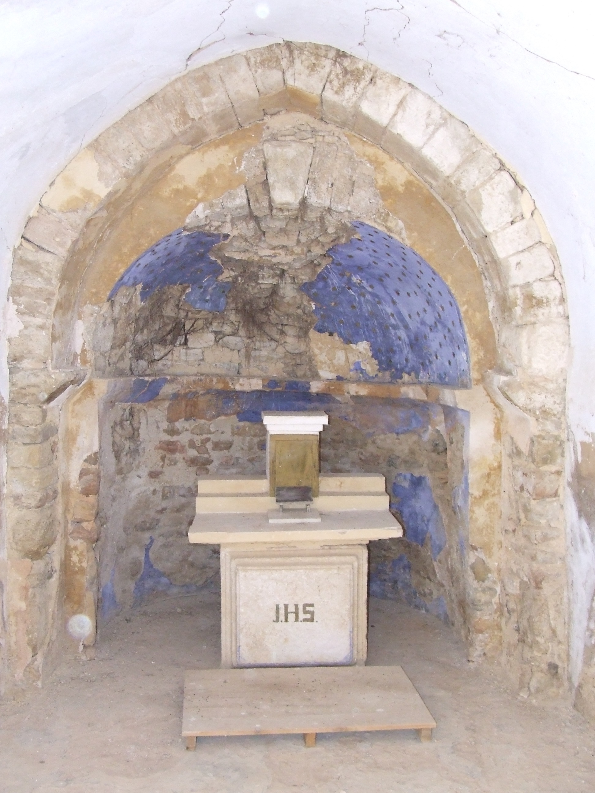 Interior (absis) de Sant Martí dels Masos de Sant Martí (Isona, Isona i Conca Dellà, Pallars Jussà)